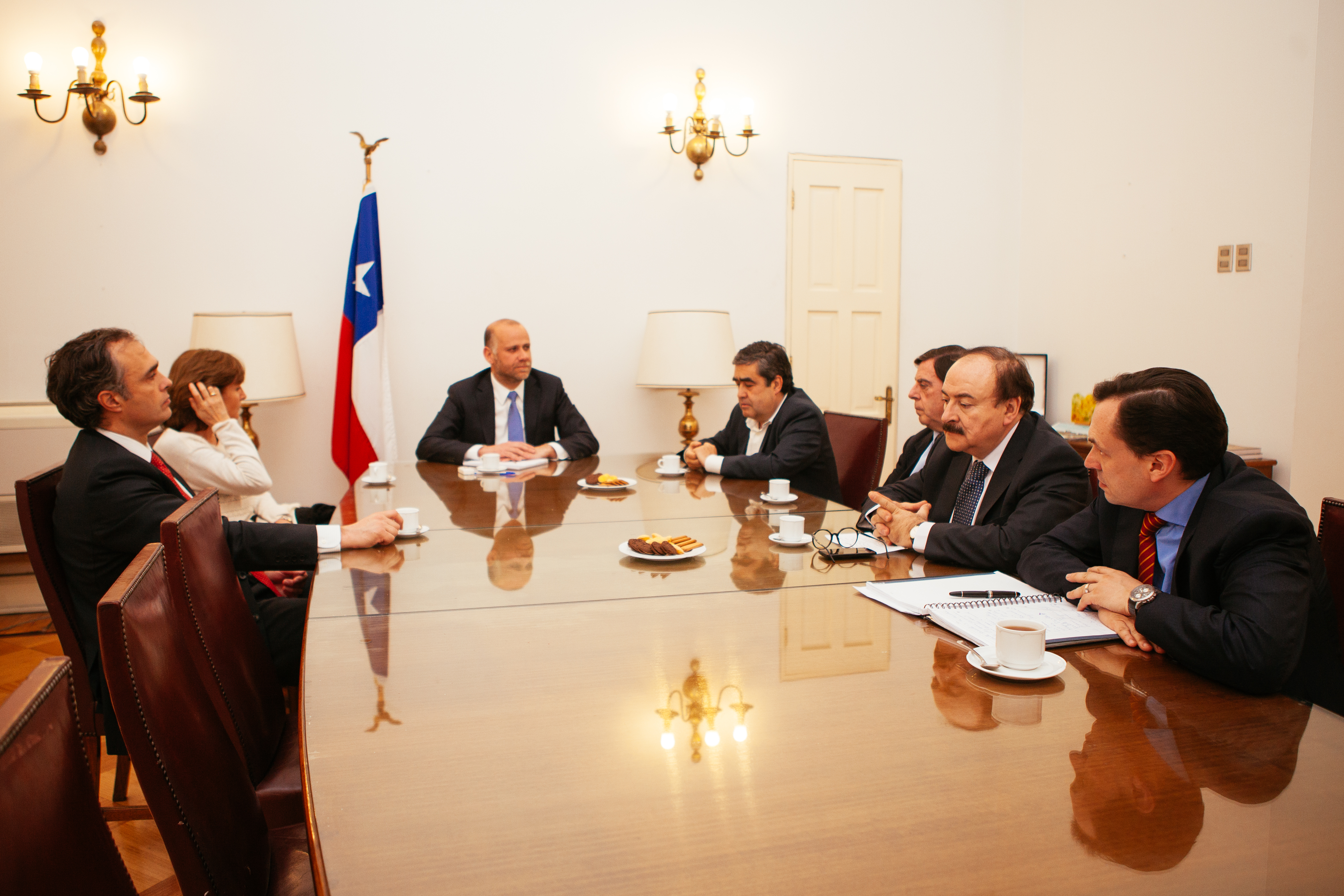 Ministro Portavoz se reunió con miembros del directorio de TVN